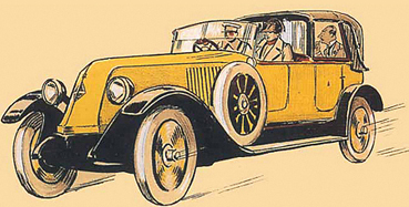 Publicite de Voiture Renault (NN, torpédo) par SEM (Georges Goursat)